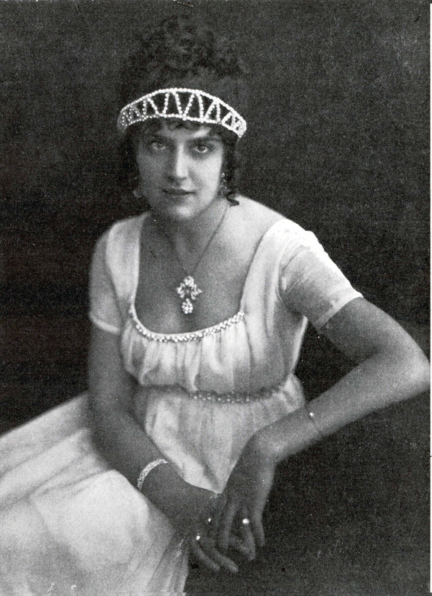 Inez Köhler (1900-1976) i titelrollen i tosca på Stora Teatern, Göteborg. (Foto i Scenen 1927).